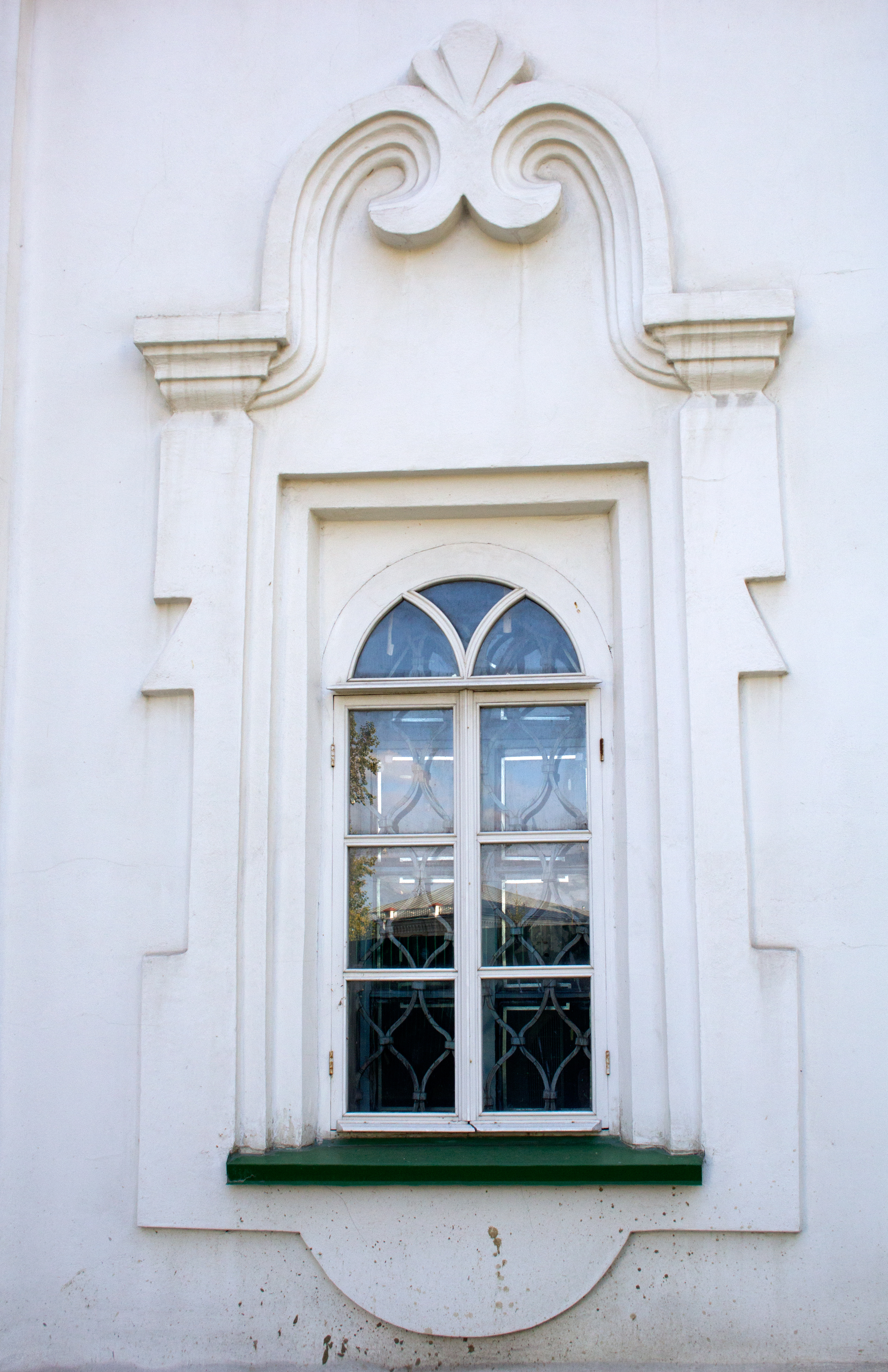 Церковь Спаса: улица Ленина, 43, Тюмень, Тюменская область